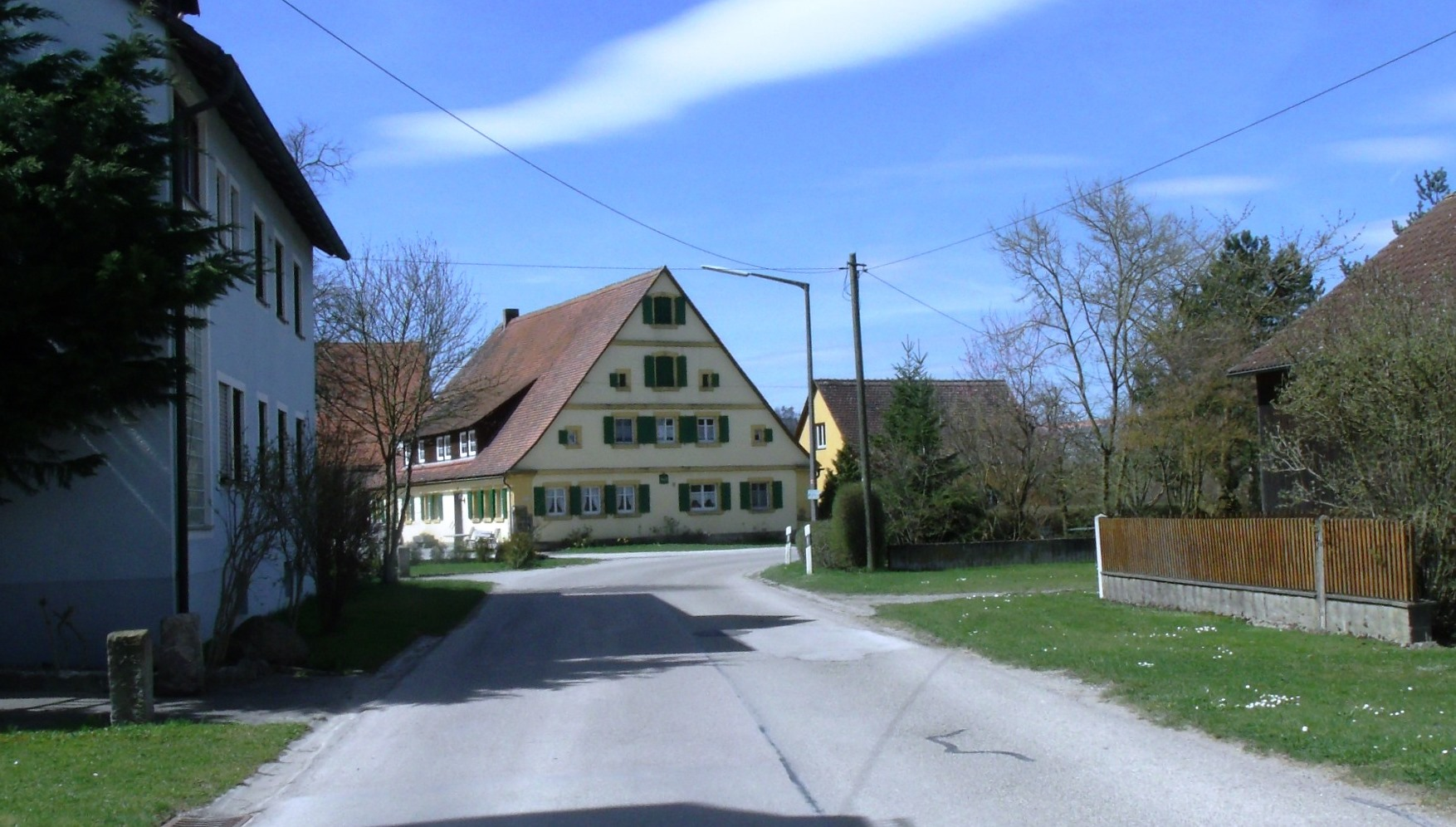 Eckartsweiler, Ortsteil von Leutershausen im Landkreis Ansbach